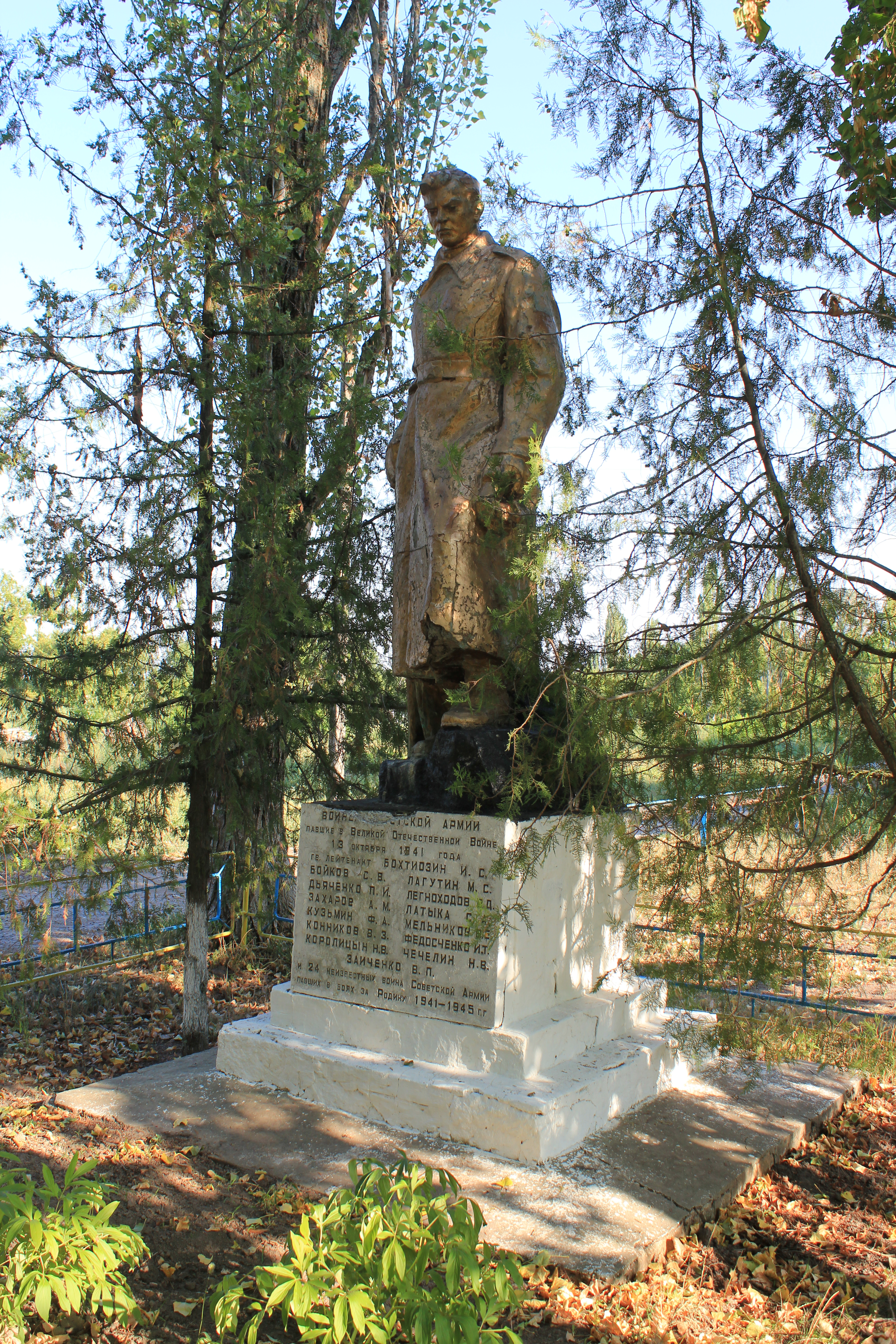 Братська могила воїнів Радянської Армії, які загинули в роки Великої Вітчизняної війни, село Панфили, центр села